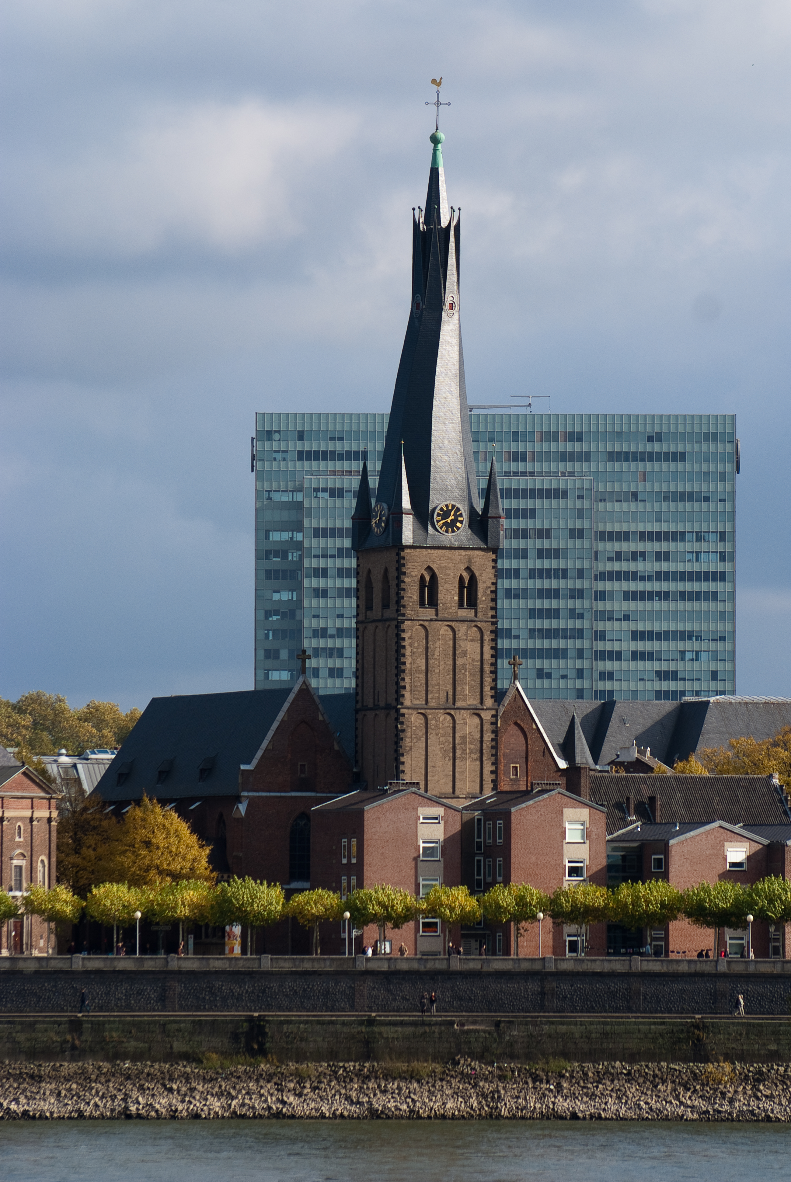 St. Lambertus Düsseldorf, gesehen vom gegenüberliegenden Rheinufer